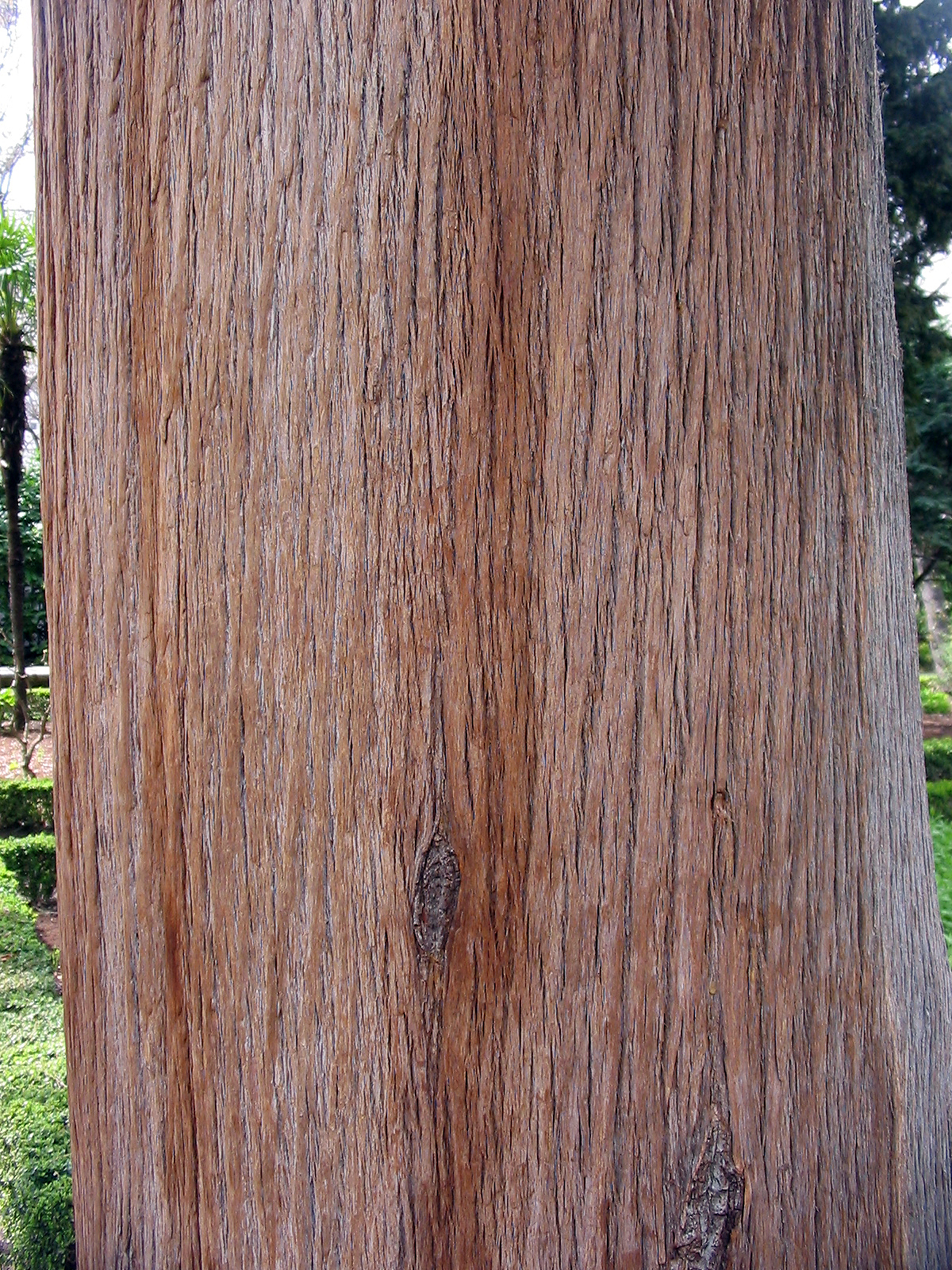 Fotografía de Pablo Alberto Salguero Quiles de la textura del tronco de Cupressus sempervirens de las Cupressaceae, se le supone nativo del Mediterráneo oriental. En España se le llama Ciprés común. La fotografía está realizada en el Real Jardín Botánico de Madrid. España.